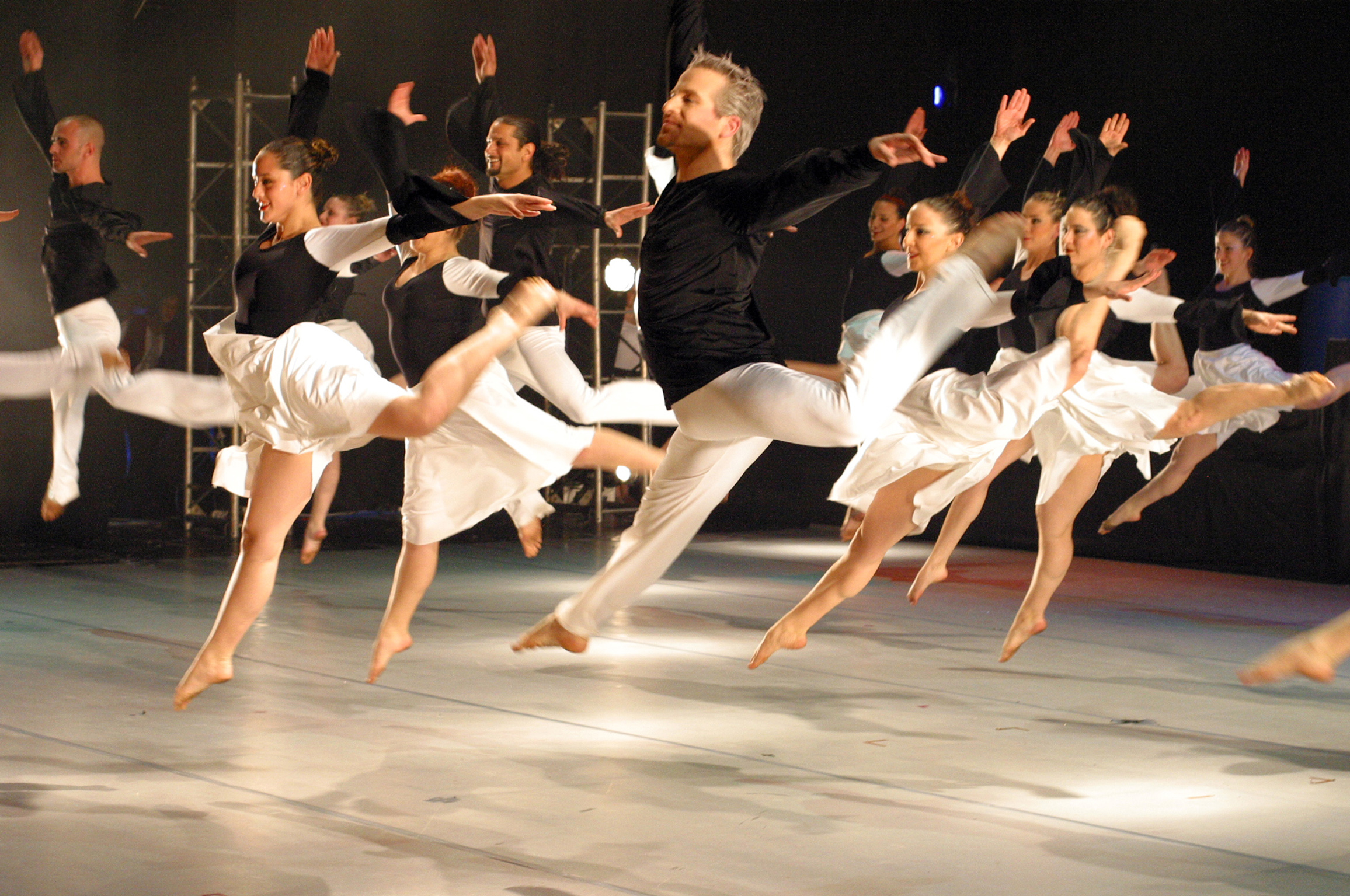 הלהקה הבוגרת של מחולה, מתוך הריקוד "זן נדיר". צילום: מל בריקמן